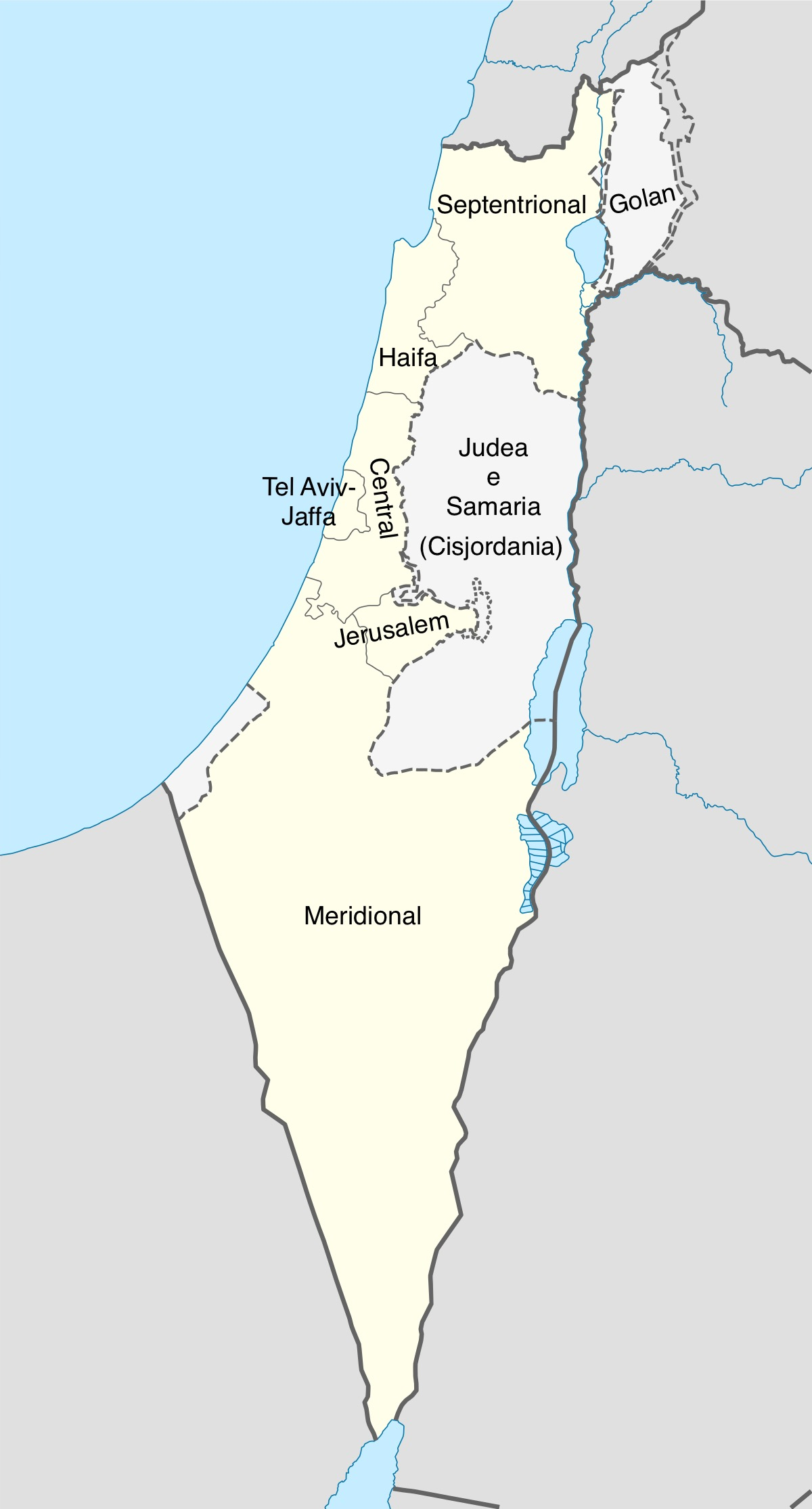 Interlingua: Mappa del districtos de Israel. Ultra le lineas grise in tractos, le territorios contendite de Cisjordania e Alturas del Golan.